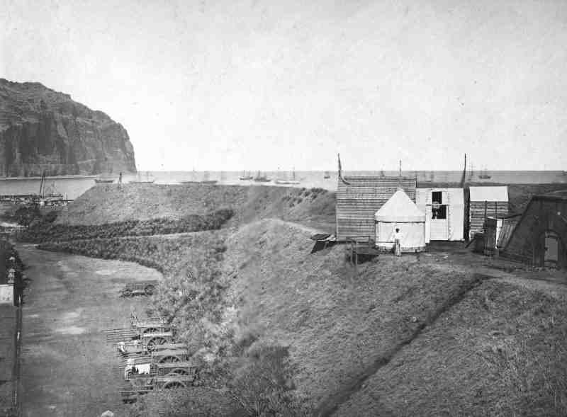 Photographie du camp d'observation des Hollandais au Barachois prise pendant le voyage fait par Jean Abraham Chrétien Oudemans à La Réunion pour observer le transit de Vénus.